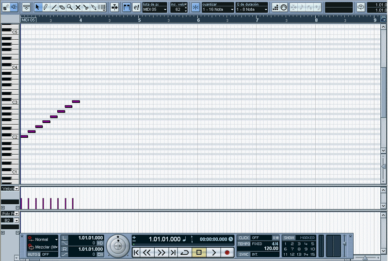 Secuenciador musical (software). Rodillo de piano.